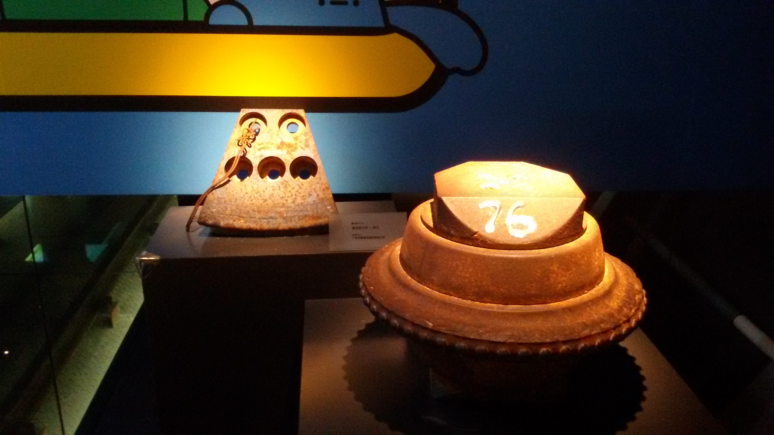 粵語: 盾構機嘅刀盤同刀具